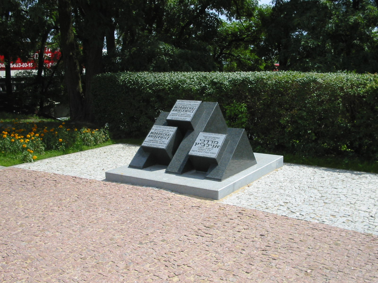 Monument to Mordechaj Anielewicz in Wyszków, Poland.